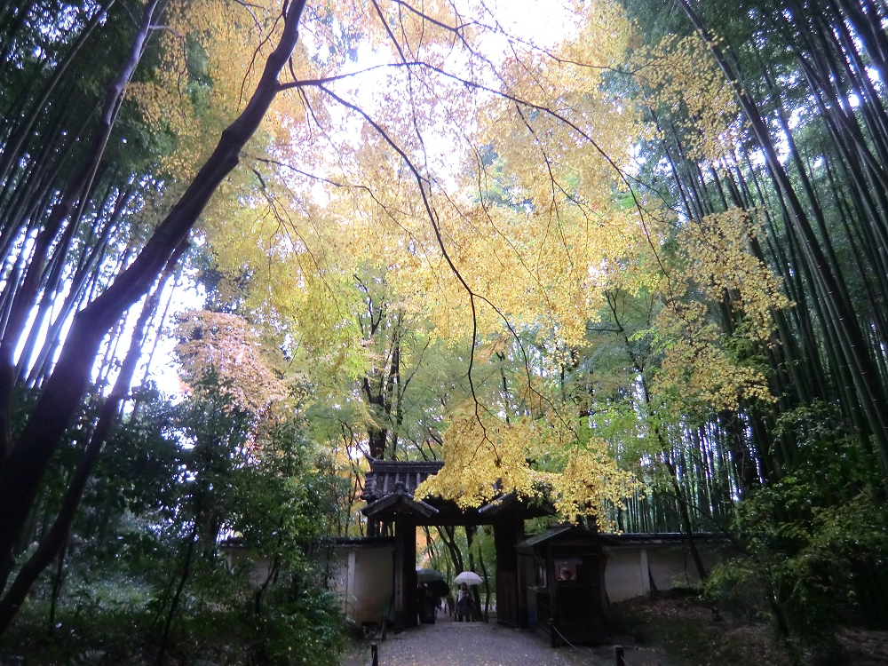 地蔵院山門